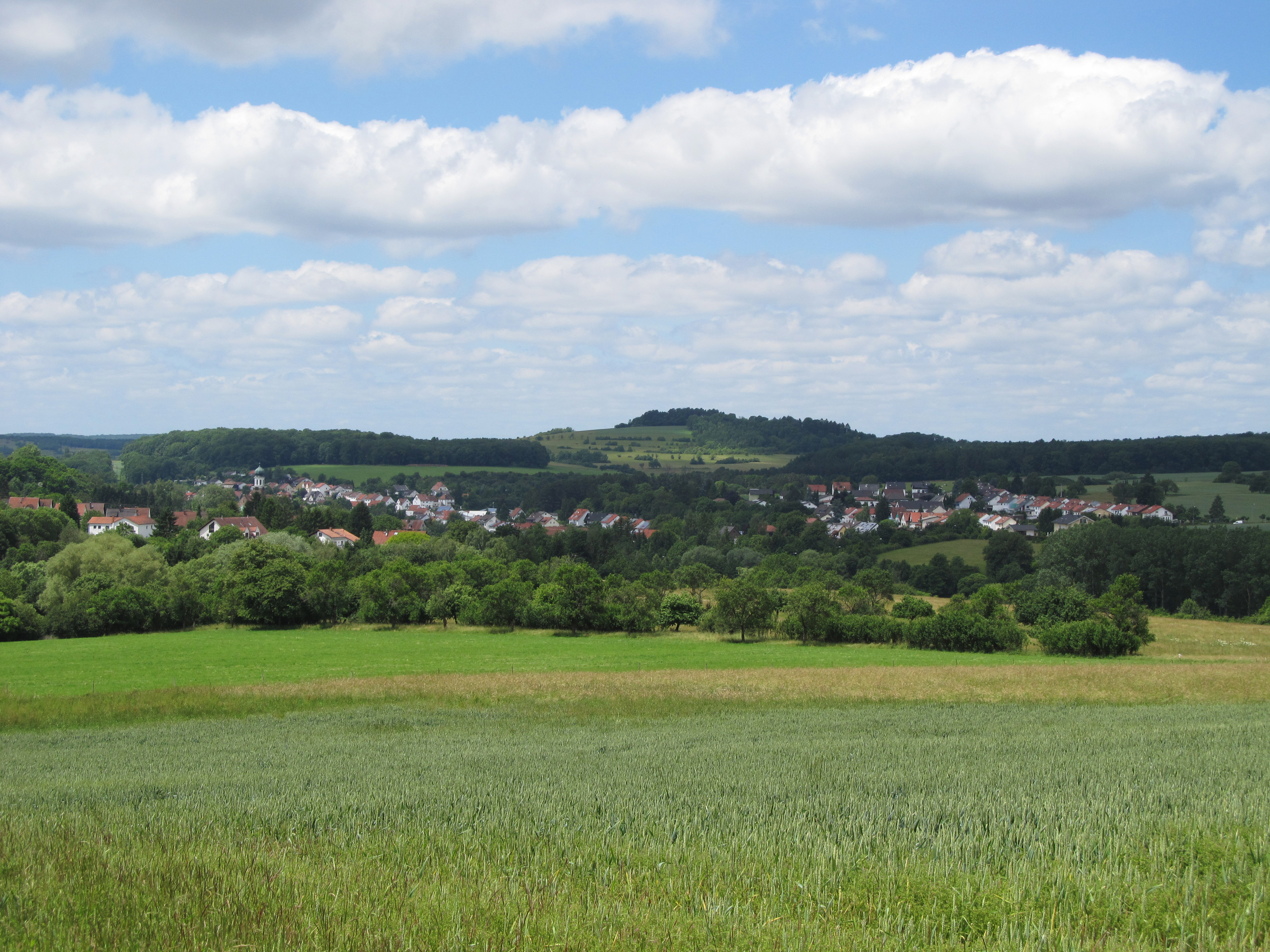 Blick auf Eschringen, einem Stadtteil von Saarbrücken, Saarland